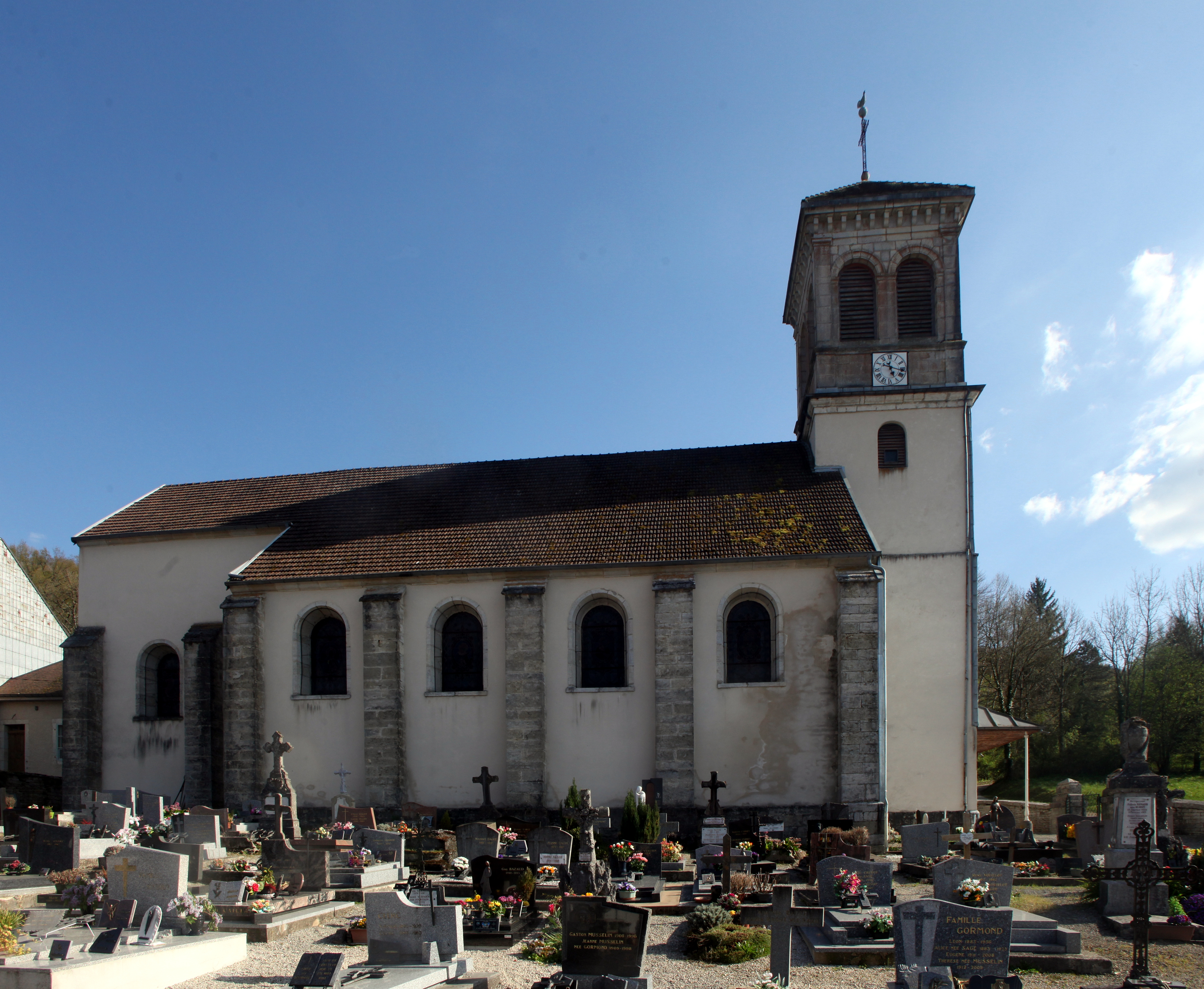 Église de Rurey (Doubs).